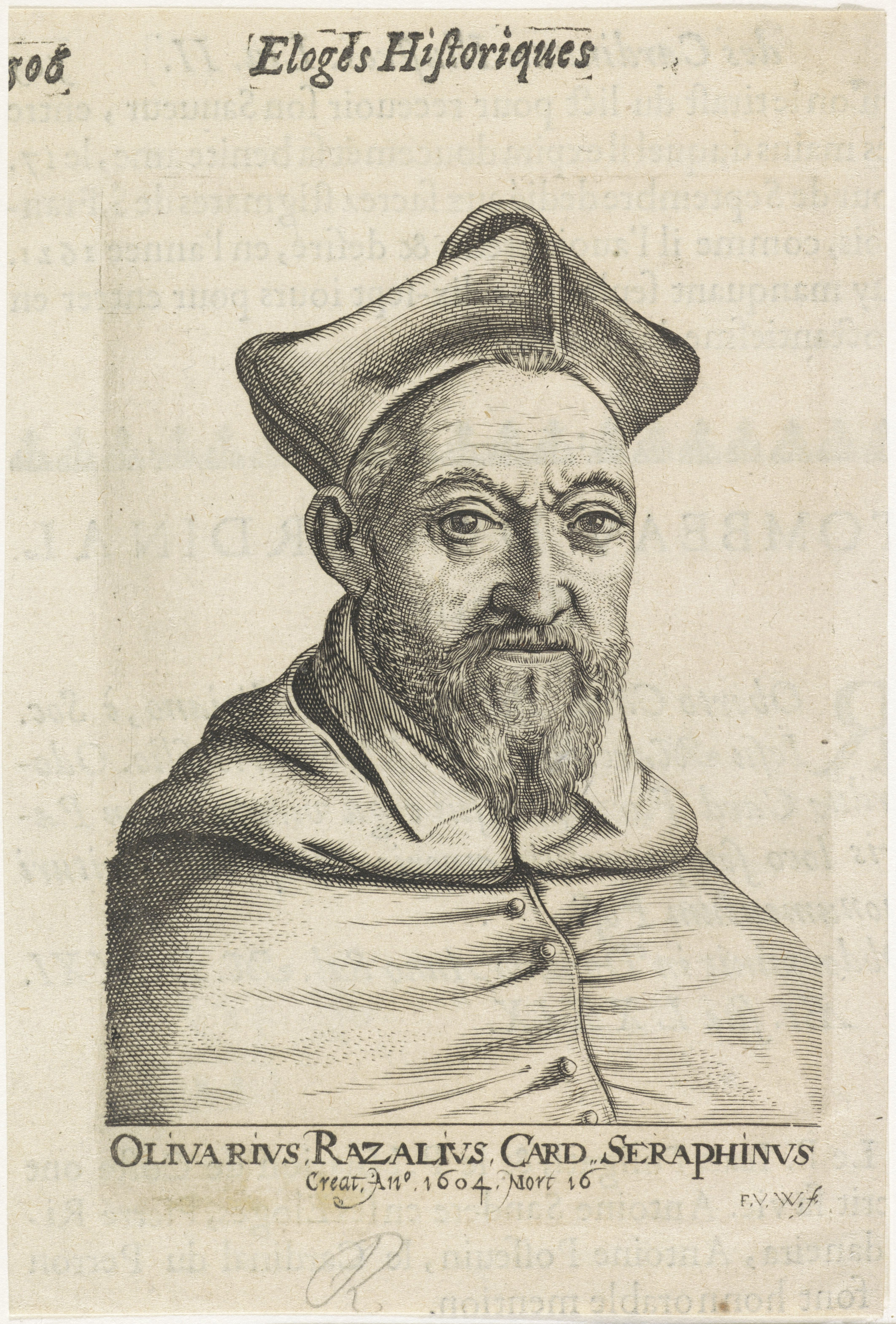 IdentificatieTitel(s): Portret van de Franse kardinaal Séraphin Olivier-RazaliOlivarivs Razalivs Card. Seraphinvs (titel op object)Portretten van kardinalen (serietitel)Objecttype: prent boekillustratie Objectnummer: RP-P-1909-4591Catalogusreferentie: Hollstein Dutch 74Opschriften / Merken: verzamelaarsmerk, verso rechtsonder, gestempeld: Lugt 2228VervaardigingVervaardiger: prentmaker: Frans van den Wijngaerde (vermeld op object)Plaats vervaardiging: AntwerpenDatering: 1644Fysieke kenmerken: gravure, recto en verso boekdrukMateriaal: papier Techniek: graveren (drukprocedé) / boekdrukAfmetingen: plaatrand: h 133 mm × b 93 mmToelichtingPrent uit: Albi, Henri. Eloges historiques des Cardinaux illustres François et etrangers mis en parallele. Parijs: Anthoine de Cay, 1644.OnderwerpWat: cardinalWie: Séraphin Olivier-RazaliVerwerving en rechtenVerwerving: aankoop 1905Copyright: Publiek domein